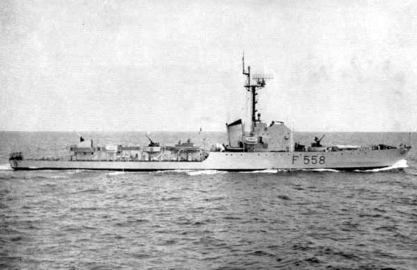 Nave Orsa dopo essere entrata a far parte della Marina Militare e la riclassificazione a fregata antisommergibile nel 1960